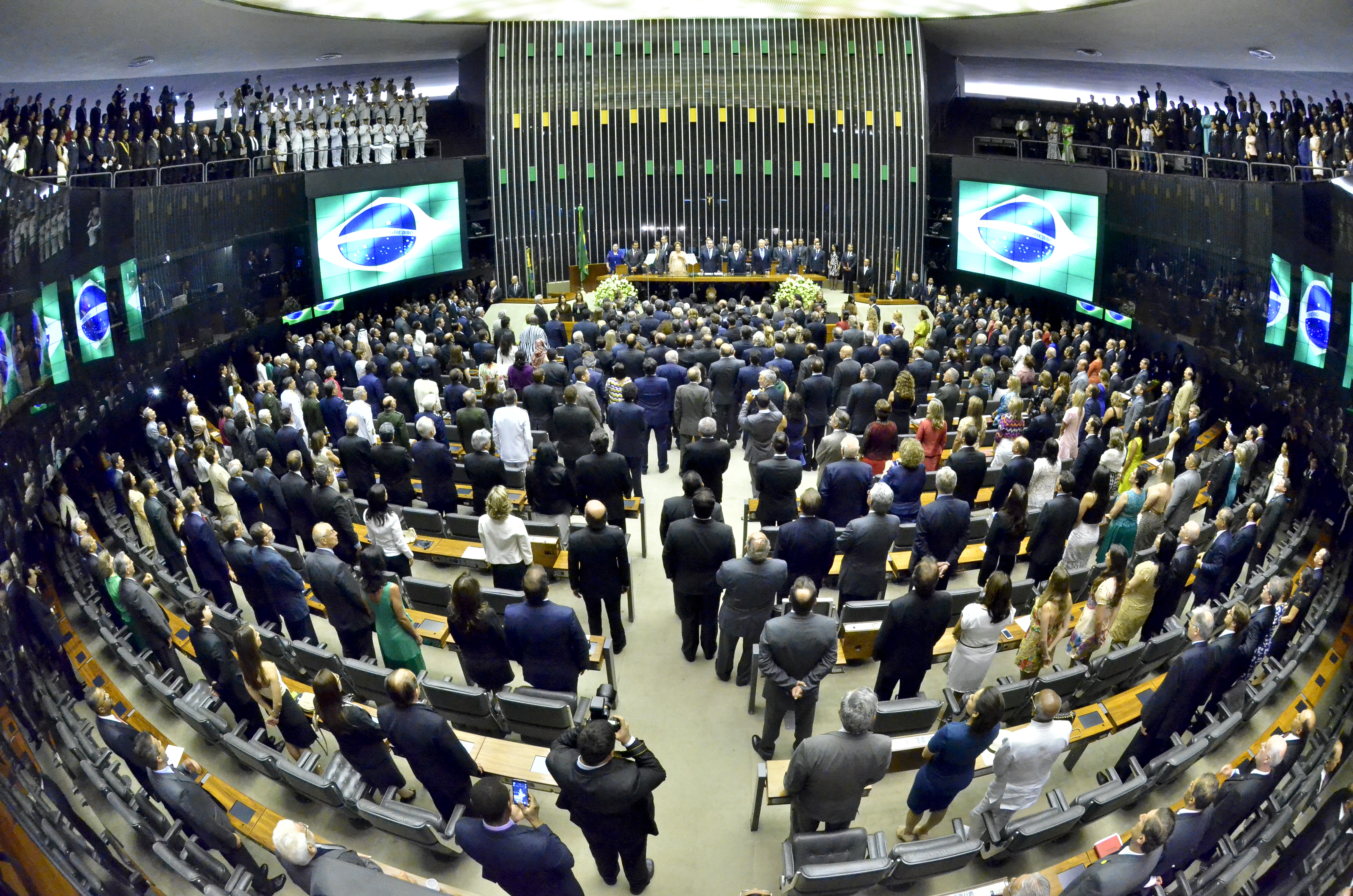 Plenário da Câmara dos Deputados durante solenidade de posse da Presidente da República Dilma Rousseff. Foto: Waldemir Barreto/Agência Senado